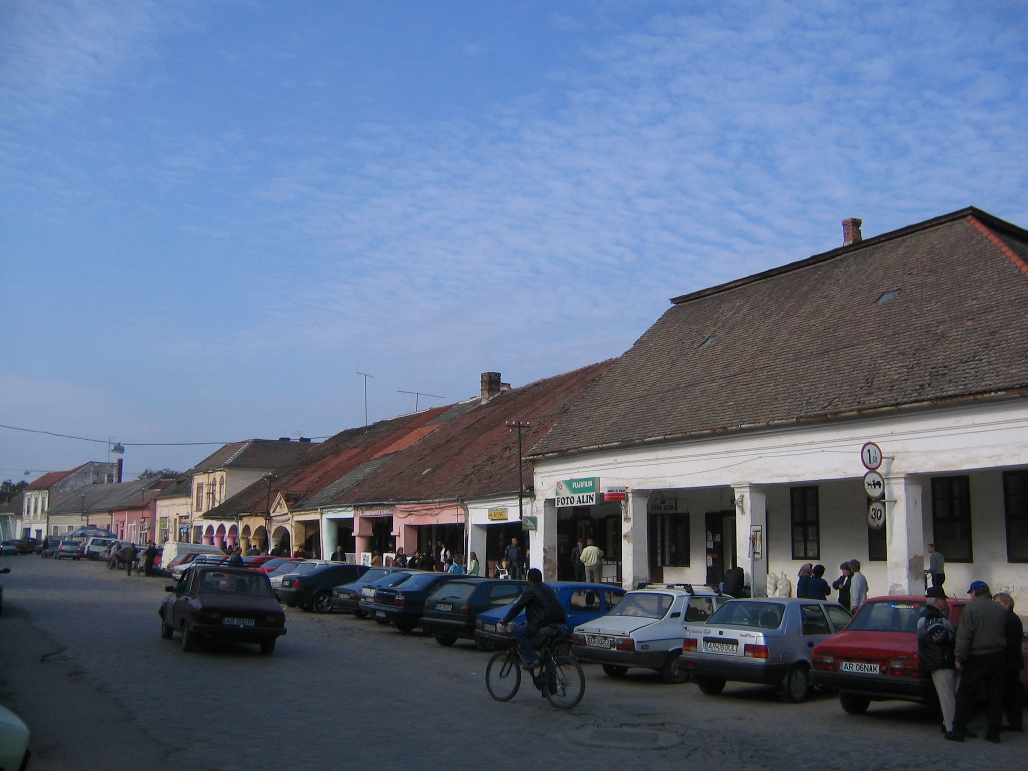 Strada Nicolae Balcescu, Lipova